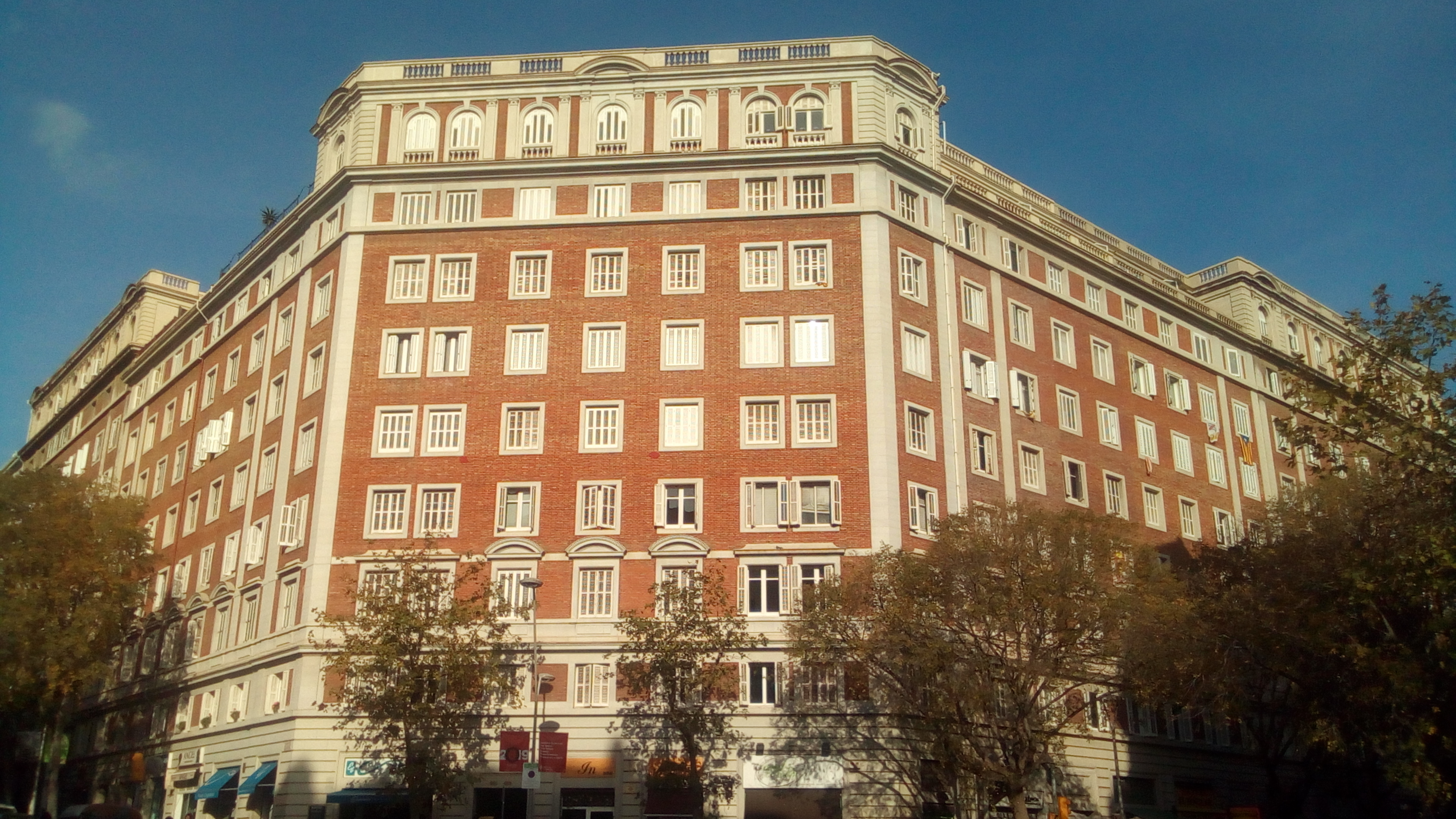 Edificio Bloc Clip (1949-1953), de Antoni Fisas y Raimon Duran i Reynals, calle de Córcega 571-597 / Lepanto 334-348 / Industria 122-136 / Padilla 301-317, Barcelona.